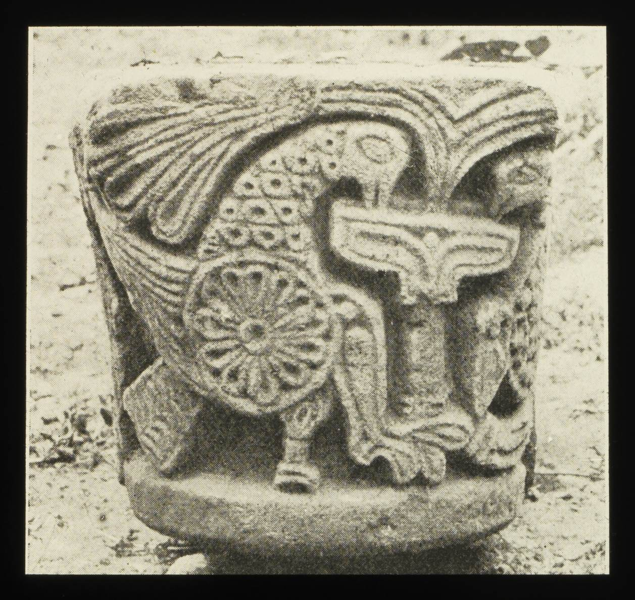 Eglise Saint-Martin de Bommes; Chapiteau